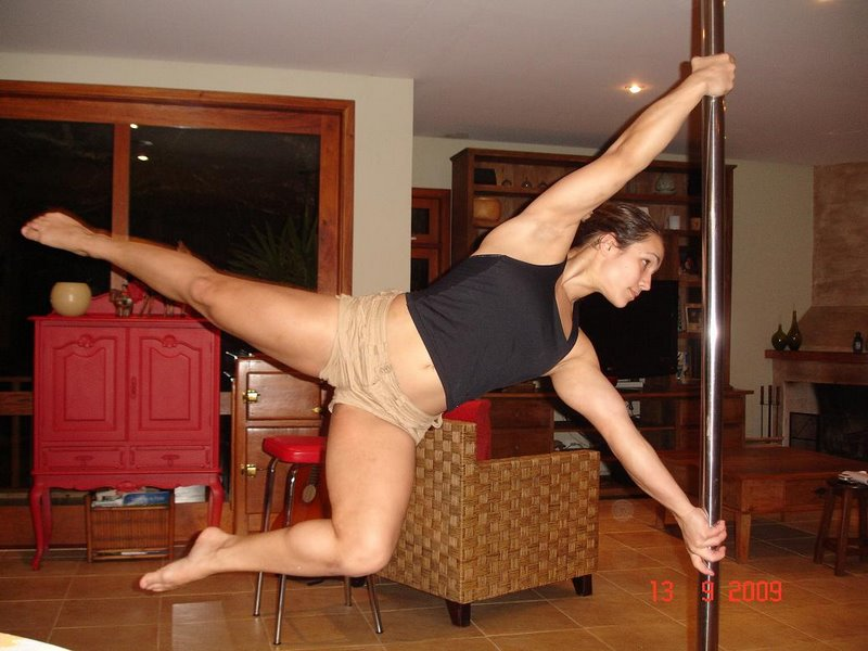 Rafaela Montanaro poledancer brasileira. Vencedora do Campeonato Brasileiro de Pole Dance e Sulamericano de 2009.